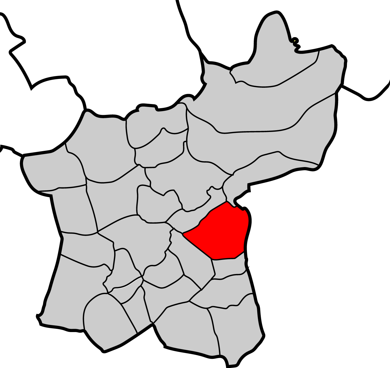 Mapa parroquia de Constantín Baralla